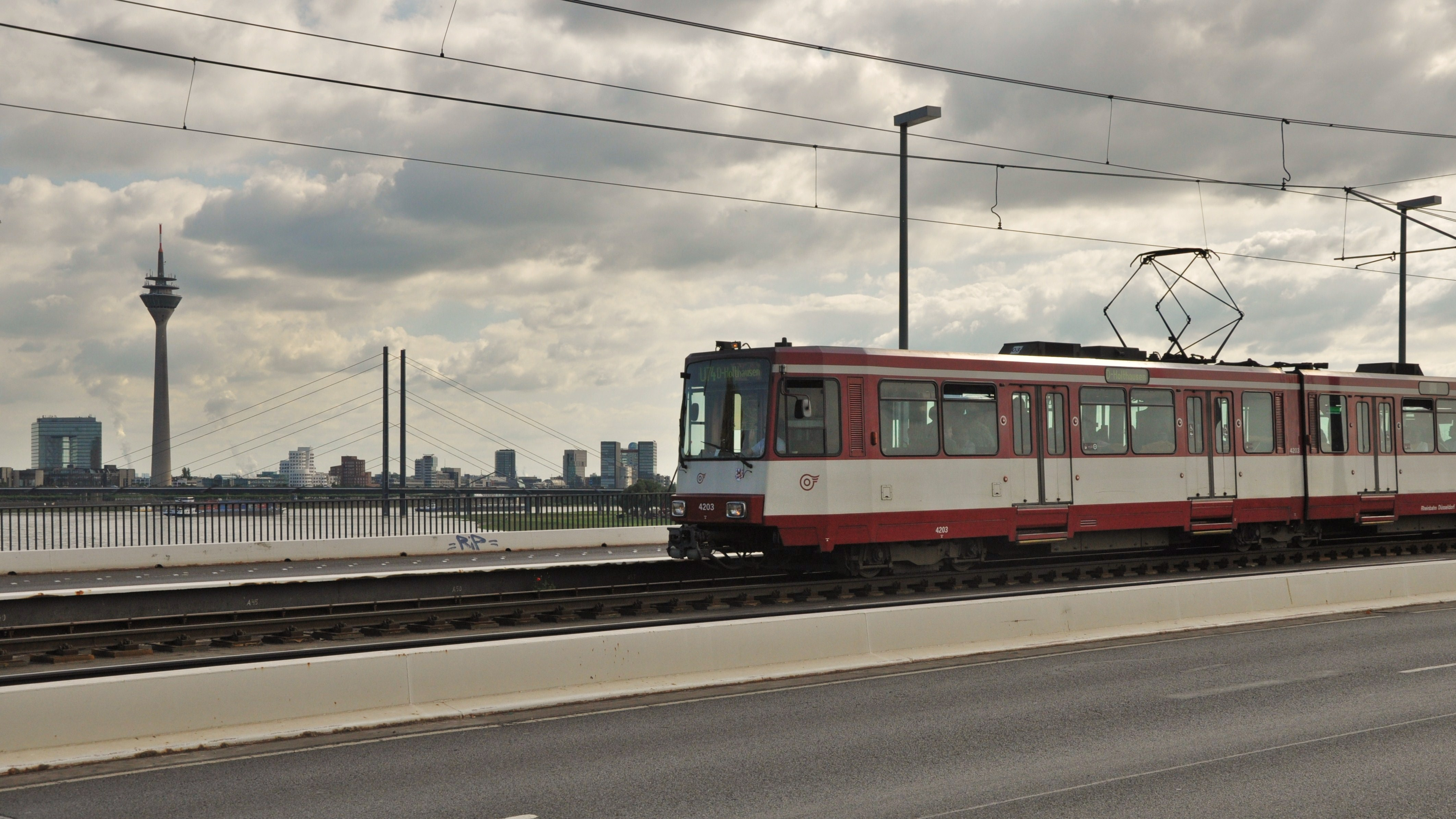 Impressionen aus dem Düsseldorfer Norden zwischen Theodor-Heuss-Brücke und Oberkasseler Brücke vom 17. Juni 2012.